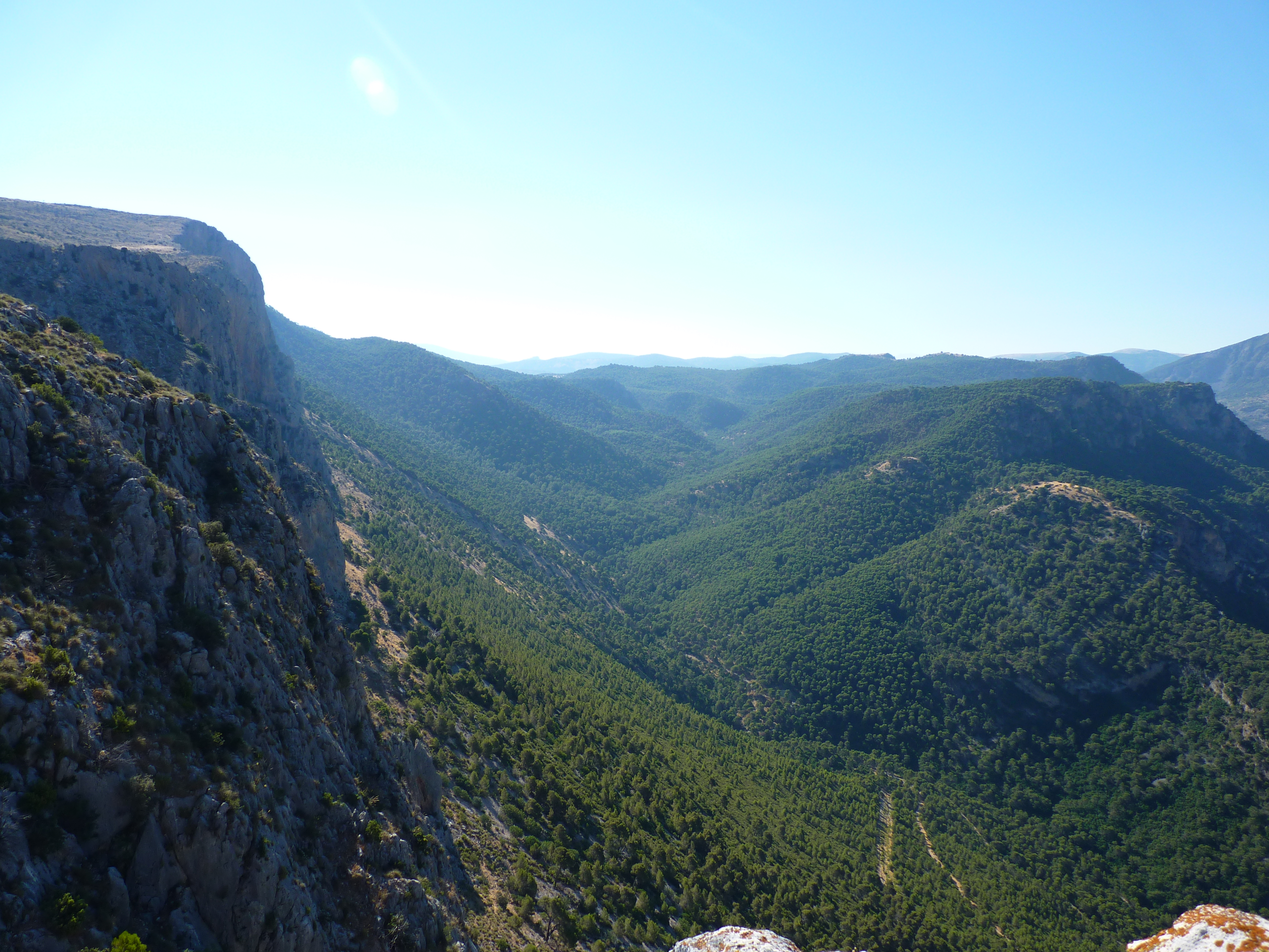 Vista de la Cañada de Las Hazadillas desde Las Alcandoras.